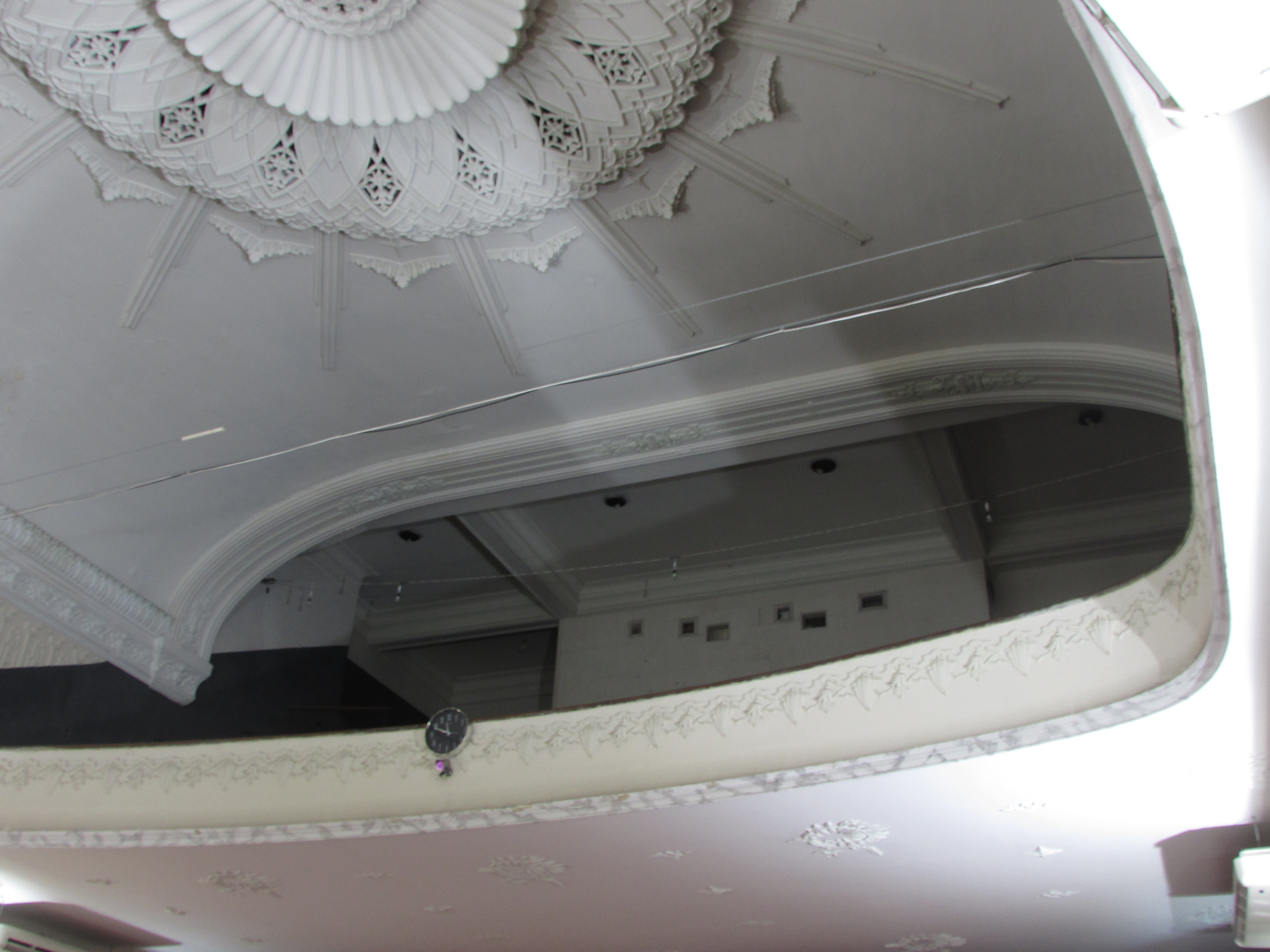 Interior do cine pathé atualmente : Projeção